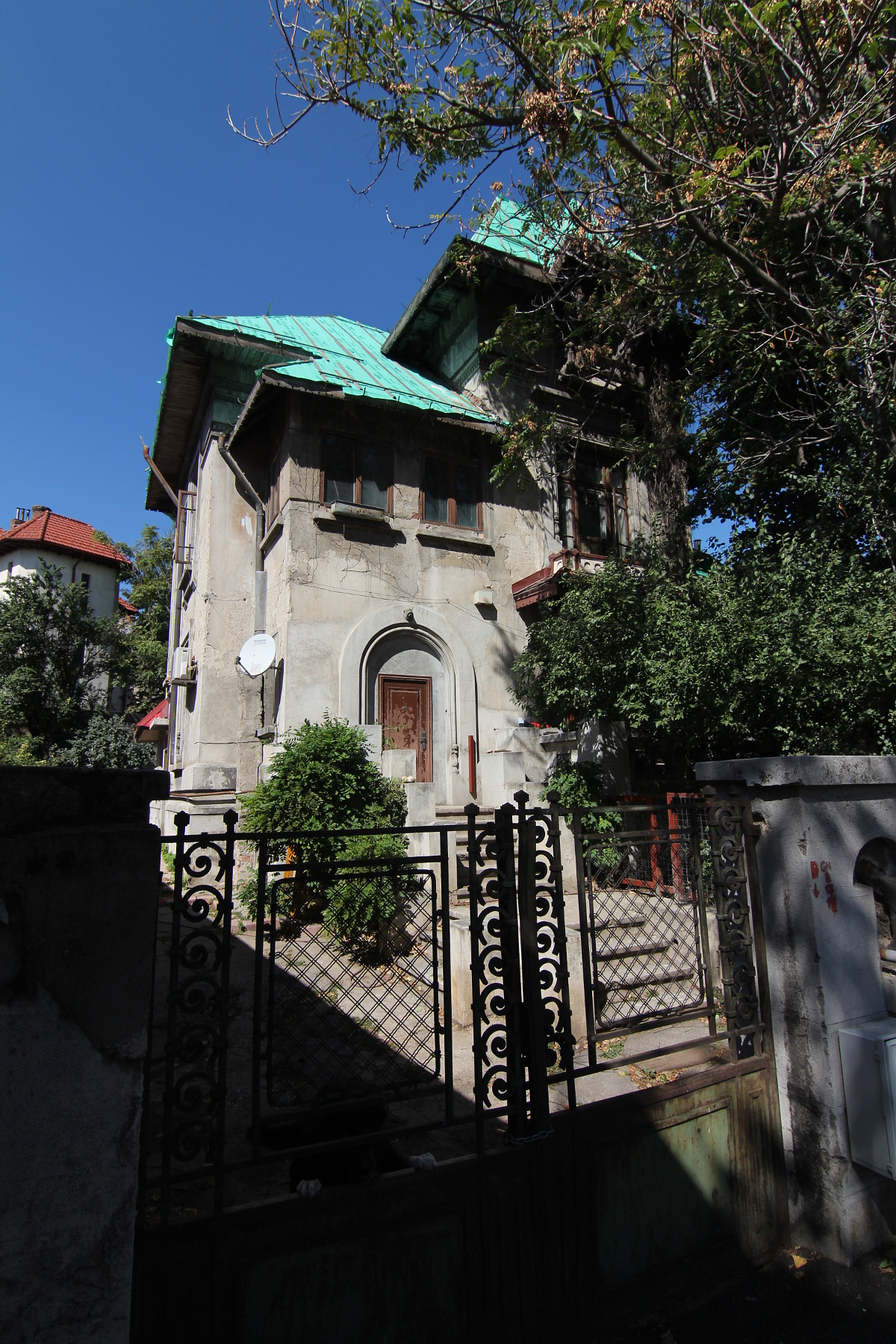 Casă pe strada Traian